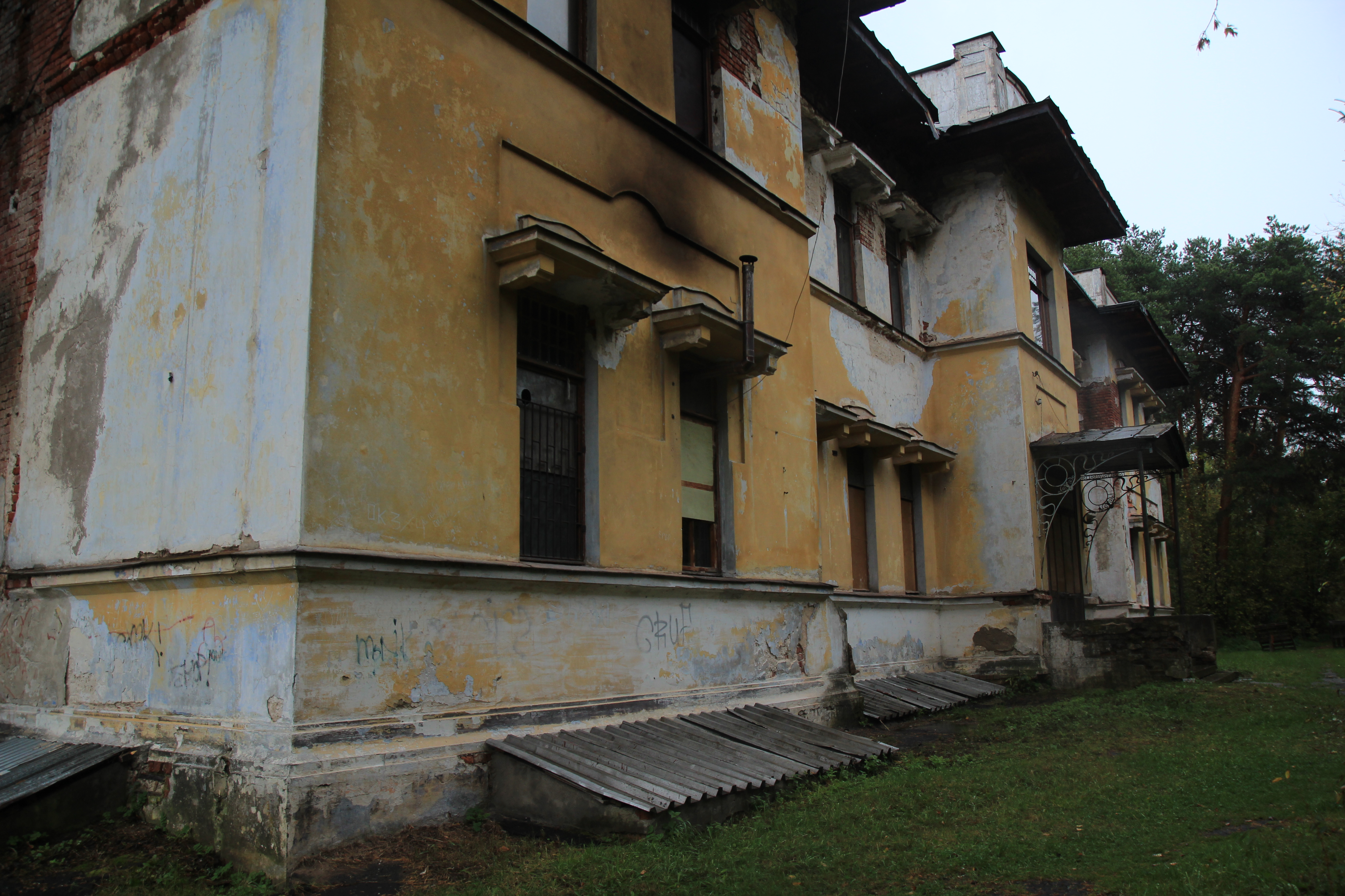 Фотография фасада дачи Севрюга